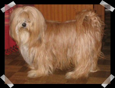 Terrier du Tibet ou Dhoki Apso